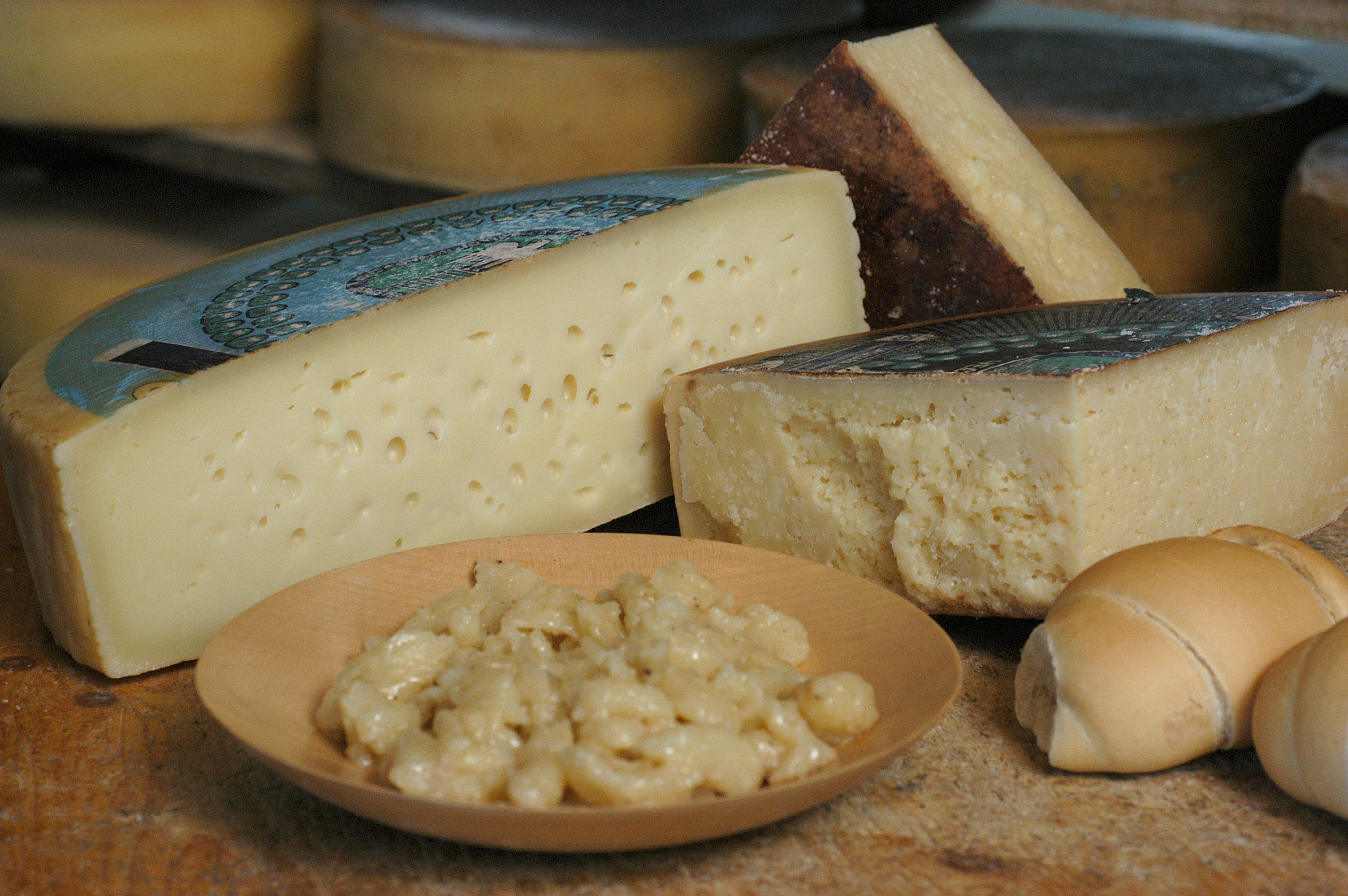 Produzione e stragionatura